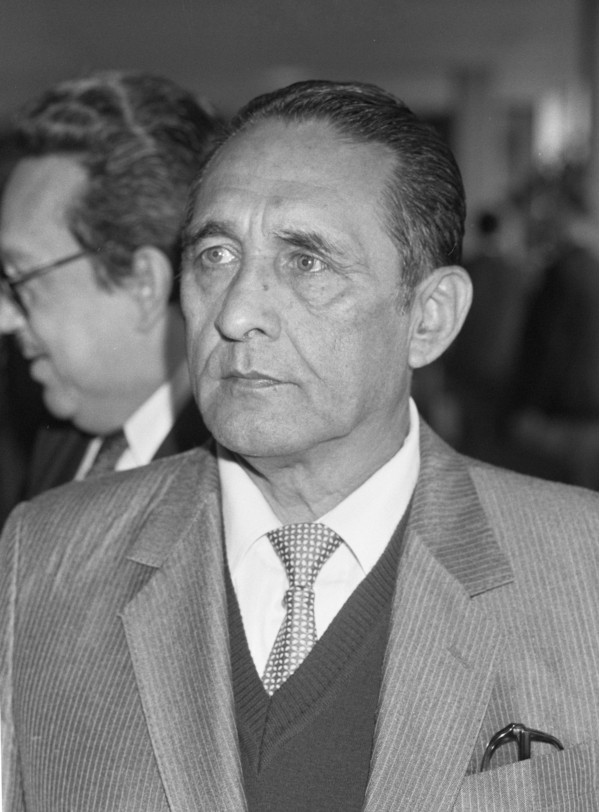 Salvadoraanse president Duarte bezoekt ons land; president Duarte , koppen